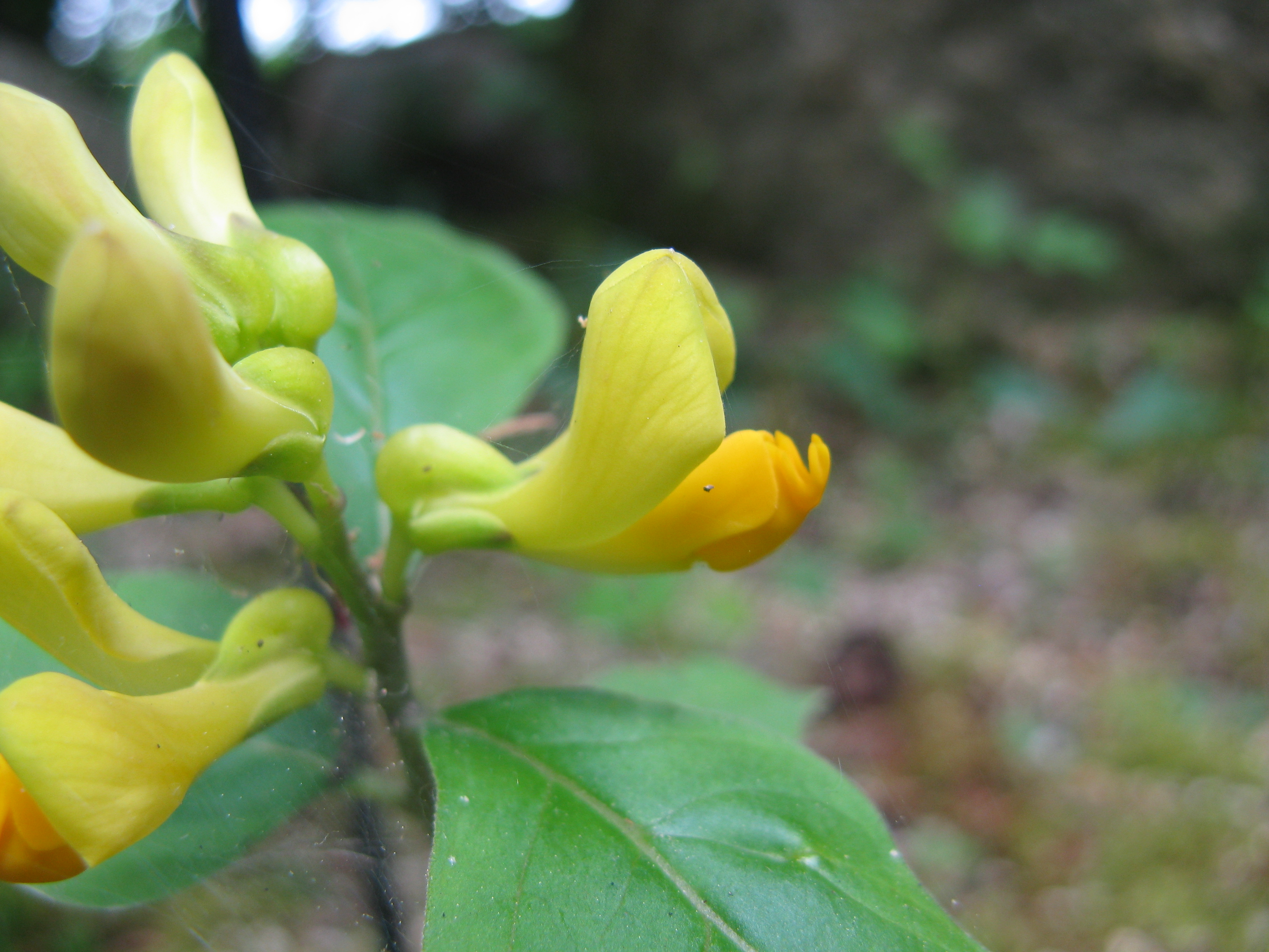 Scientific name Polygala reinii